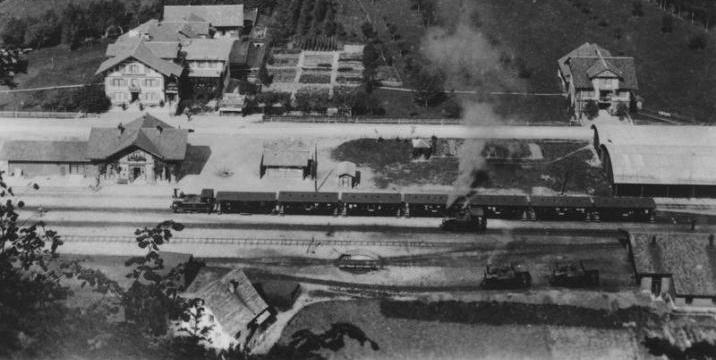 Bahnhof Giswil